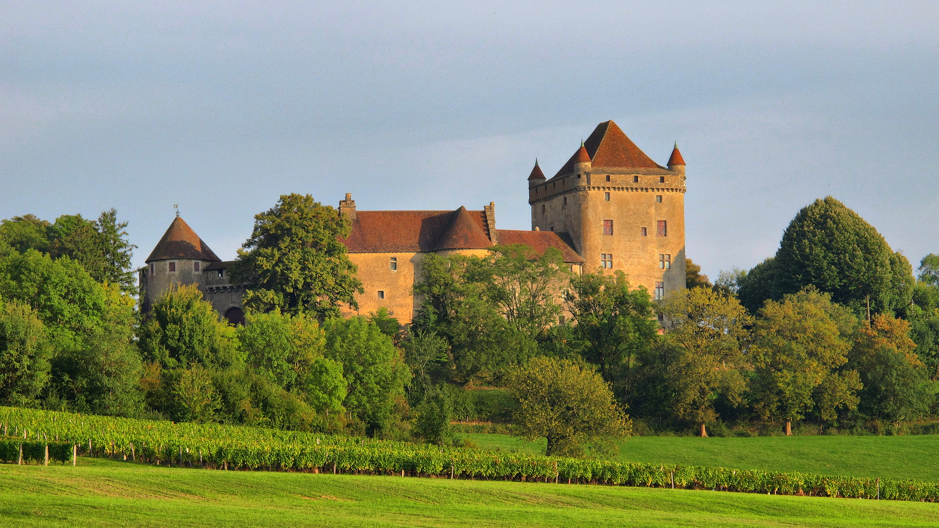 Château du Pin (InscritClassé) .